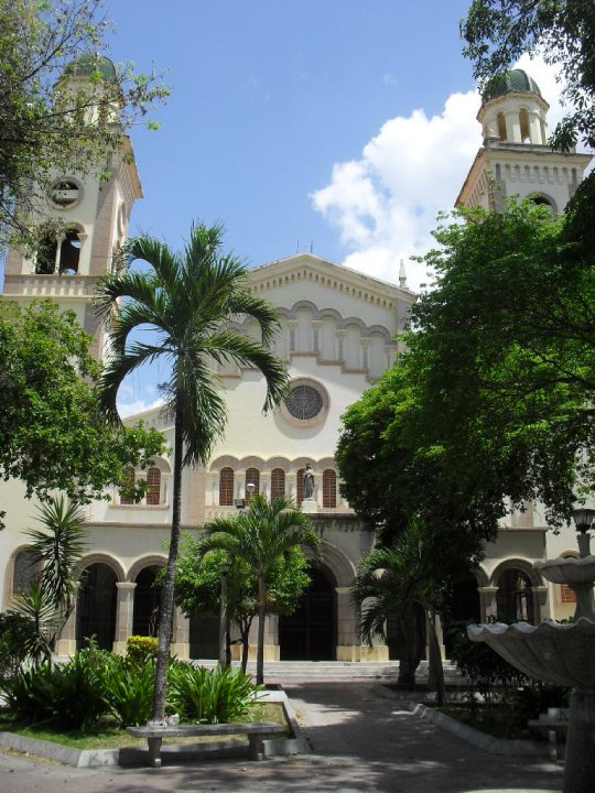 Catedral Santa Rosa